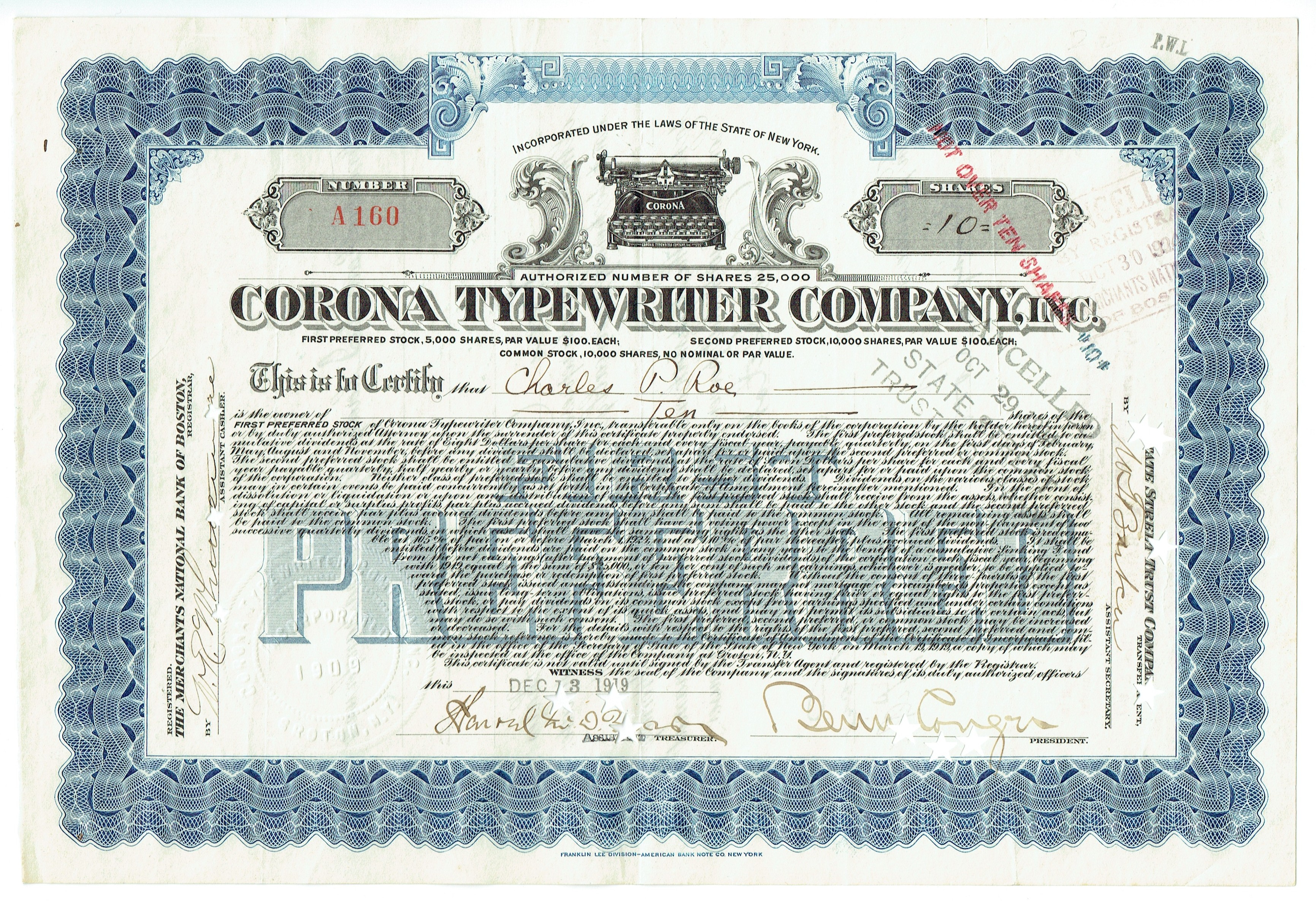 Aktie der Corona Typewriter Company vom 7. Oktober 1919